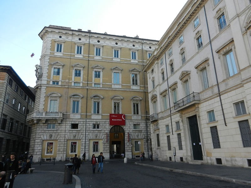 Roma - Palazzo Braschi (sede del Museo di Roma). Facciata su piazza Navona.